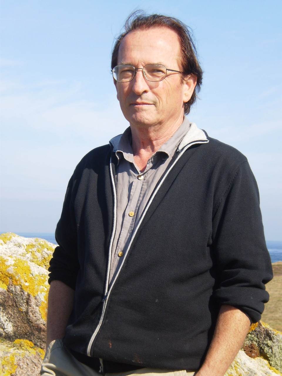 Jean Esponde, auteur